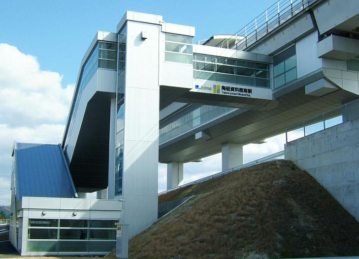 愛知県豊田市八草町に所在する東部丘陵線（リニモ）の陶磁資料館南駅。